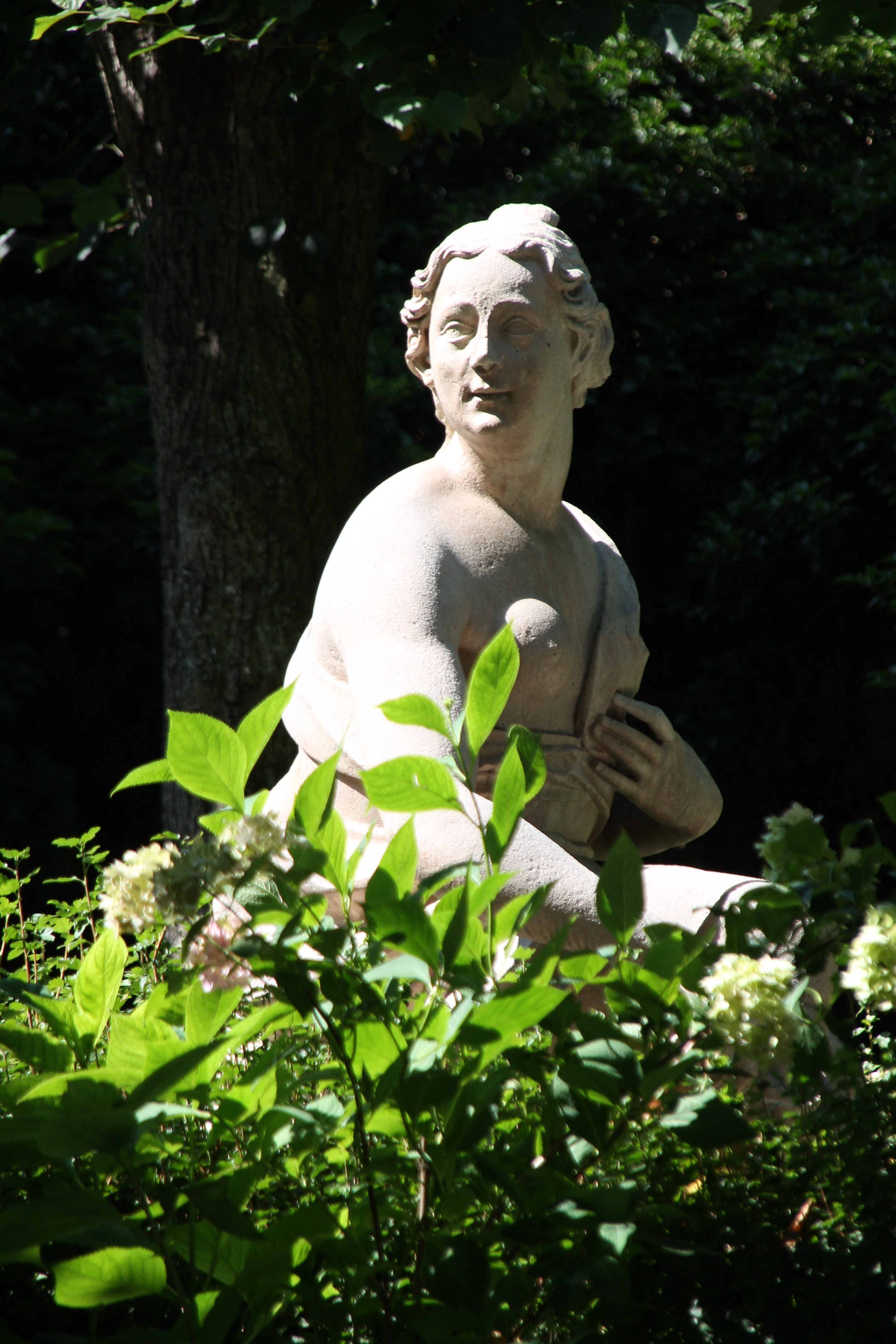 Schloss Mirabell Gesamtanlage mit allen Nebengebäuden und Gartenbaudenkmalen: Susannabrunnen